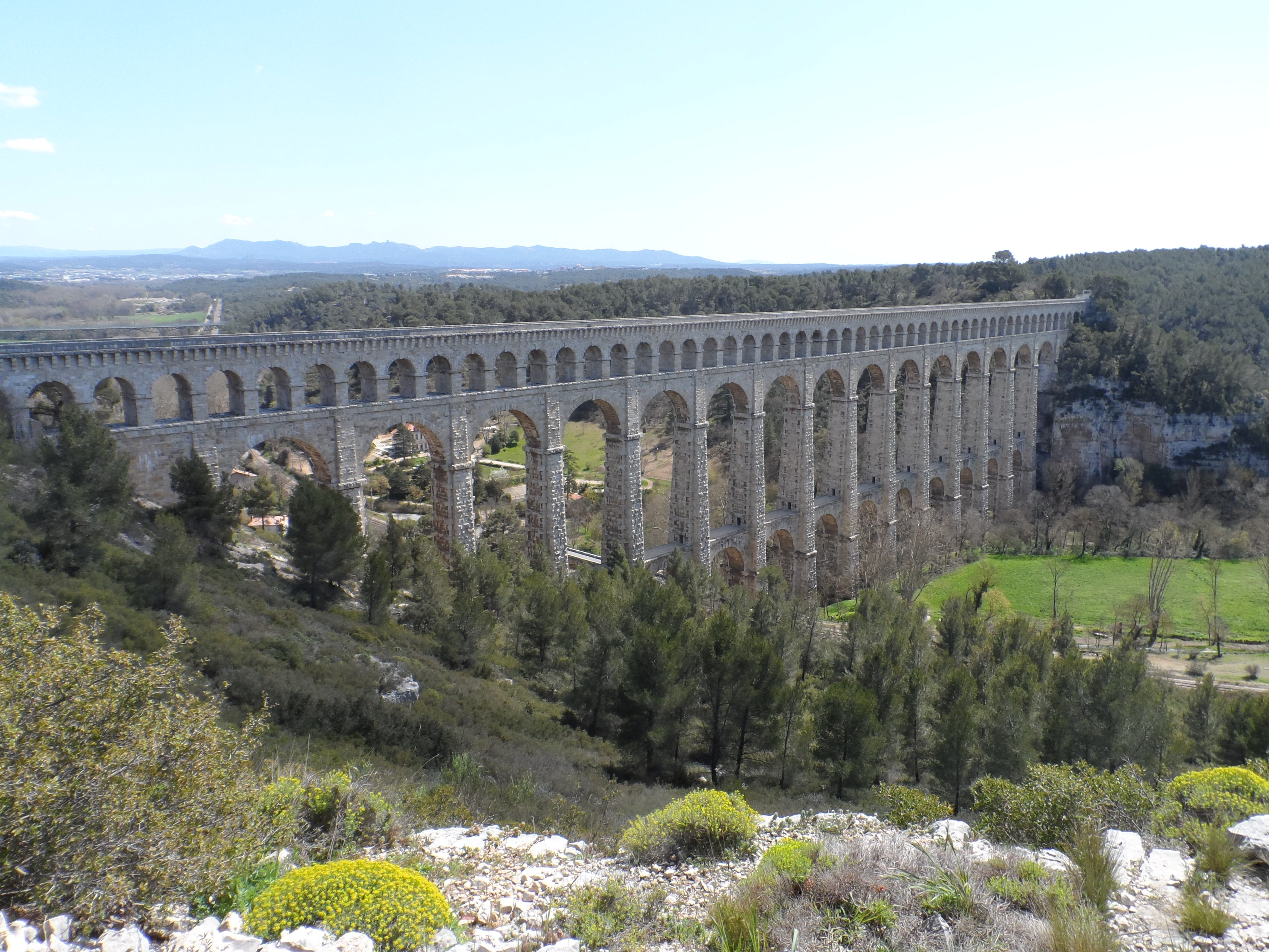 Aqueduc de Roquefavour (Bouches-du-Rhône)